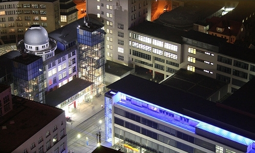 Ernst-Abbe-Platz in Jena